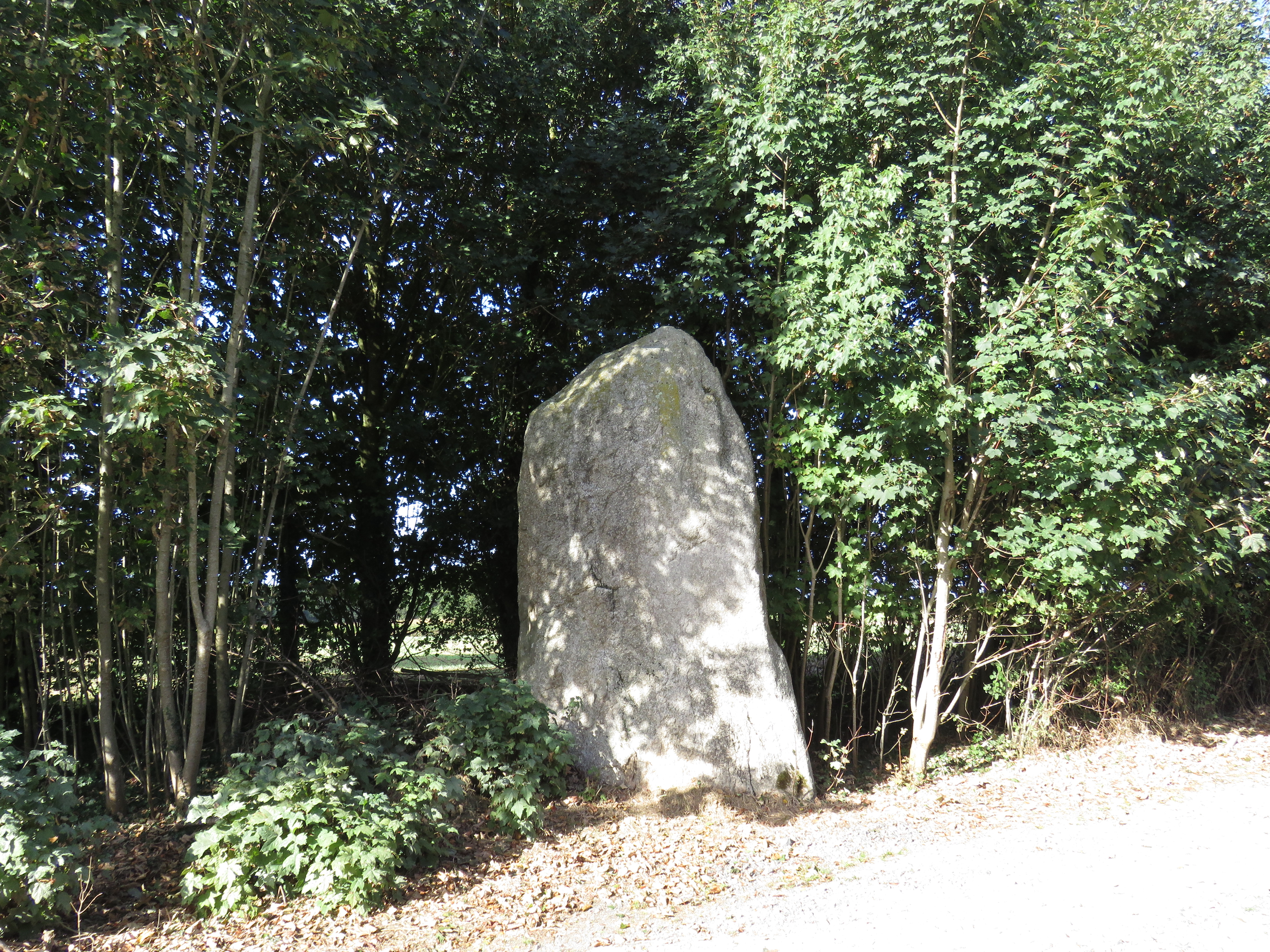 menhir